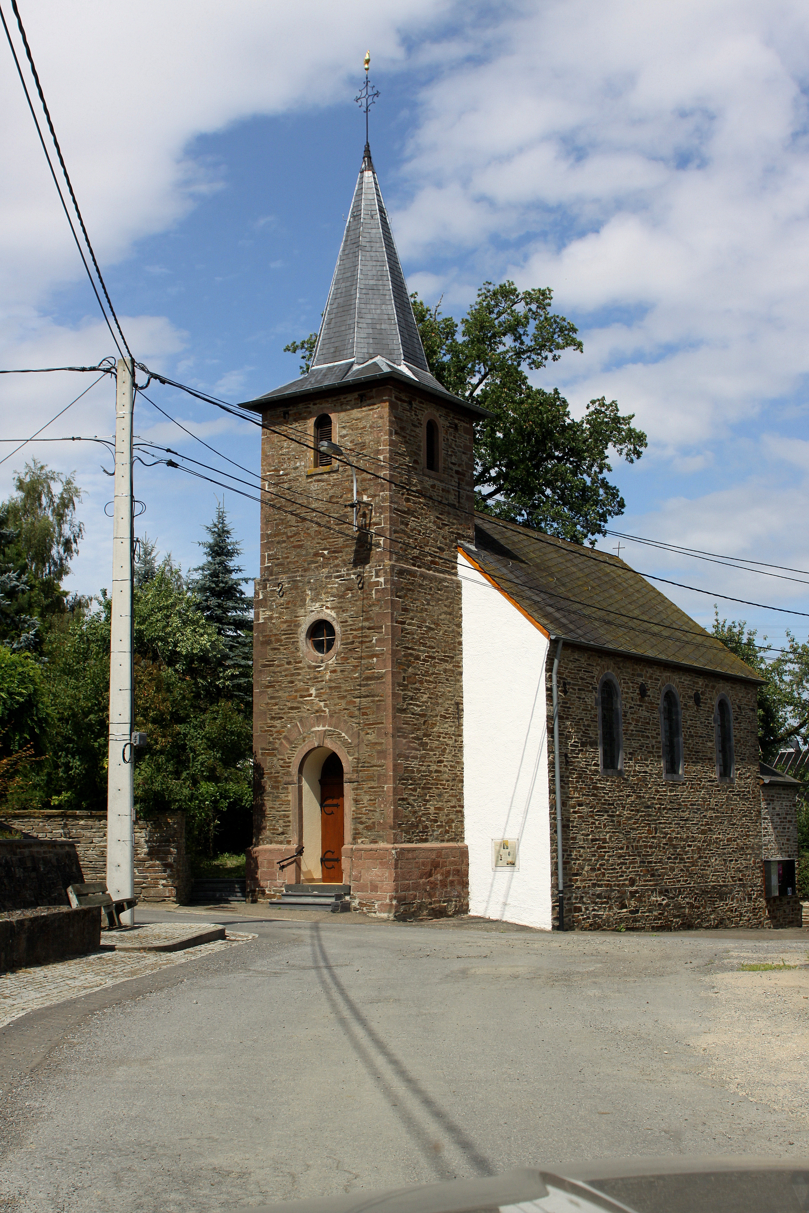 D'Méchelskapell am joer 2010